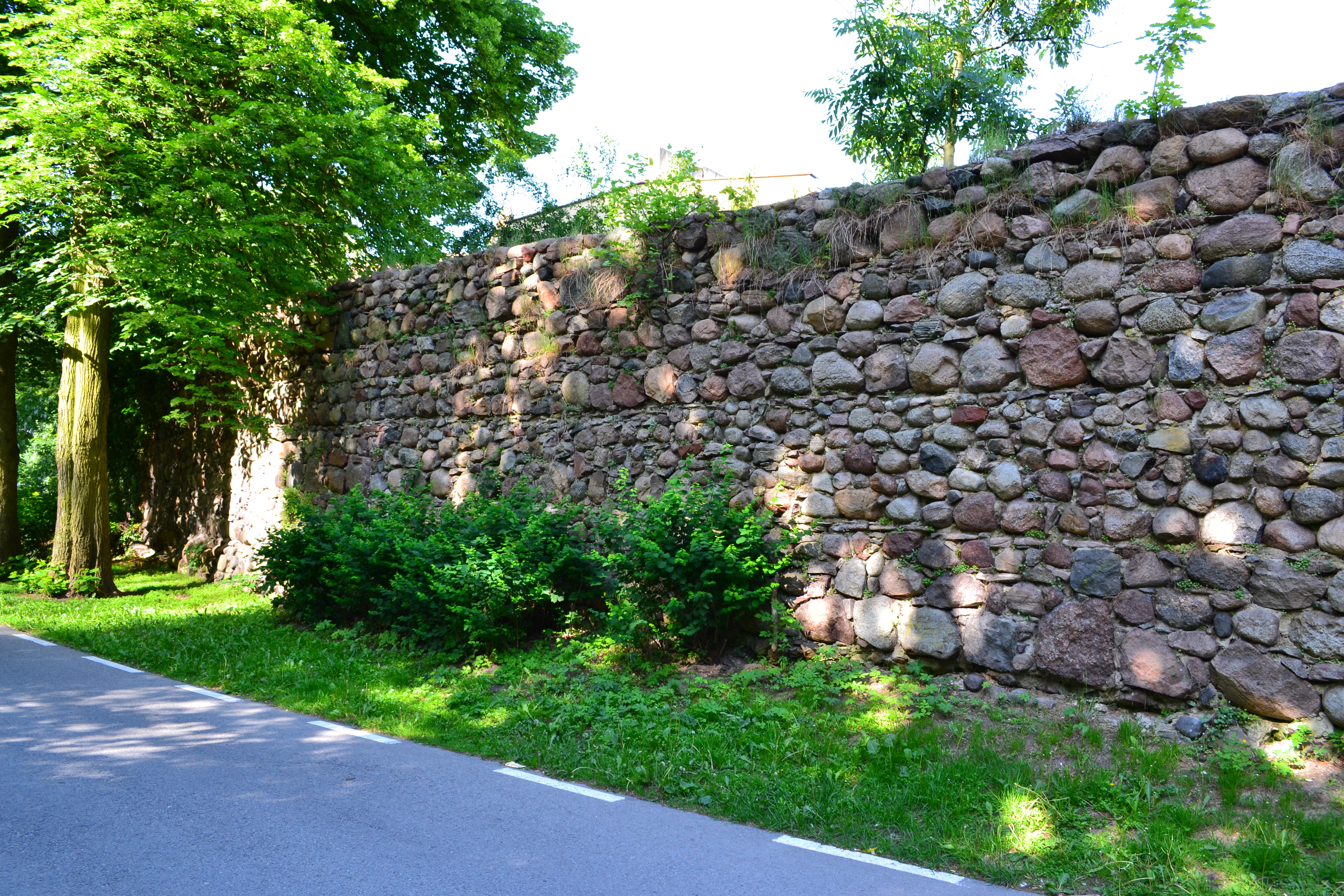 Gryfino mury obronne